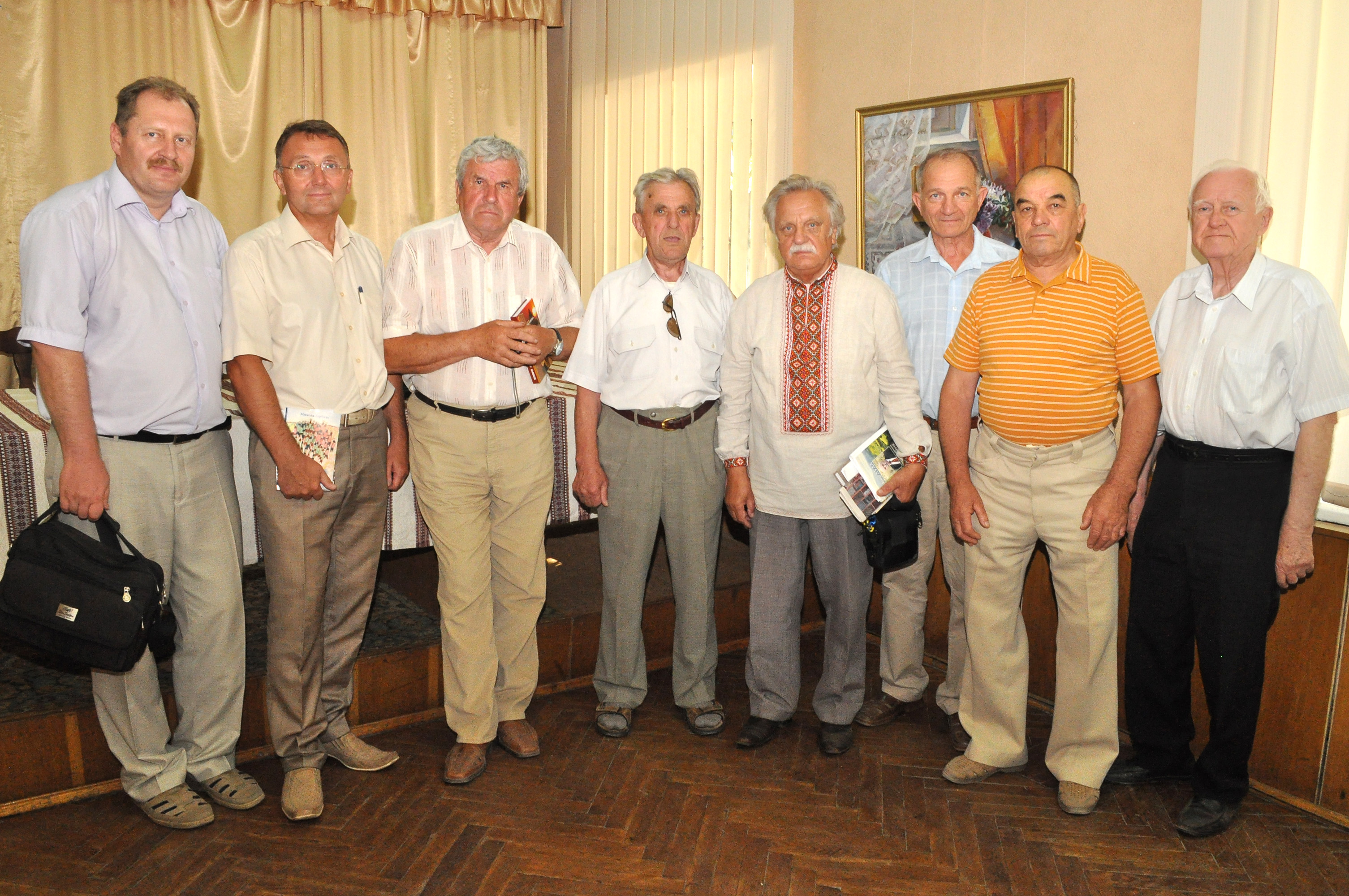 Презентація книги Миколи Горбаля «Повернення» в Тернопільському краєзнавчому музеї 25 серпня 2015 року. Зліва направо: невідомий, Михайло Ратушняк, Богдан Савак, невідомий, Микола Горбаль, невідомий, невідомий, Андрій Клим.